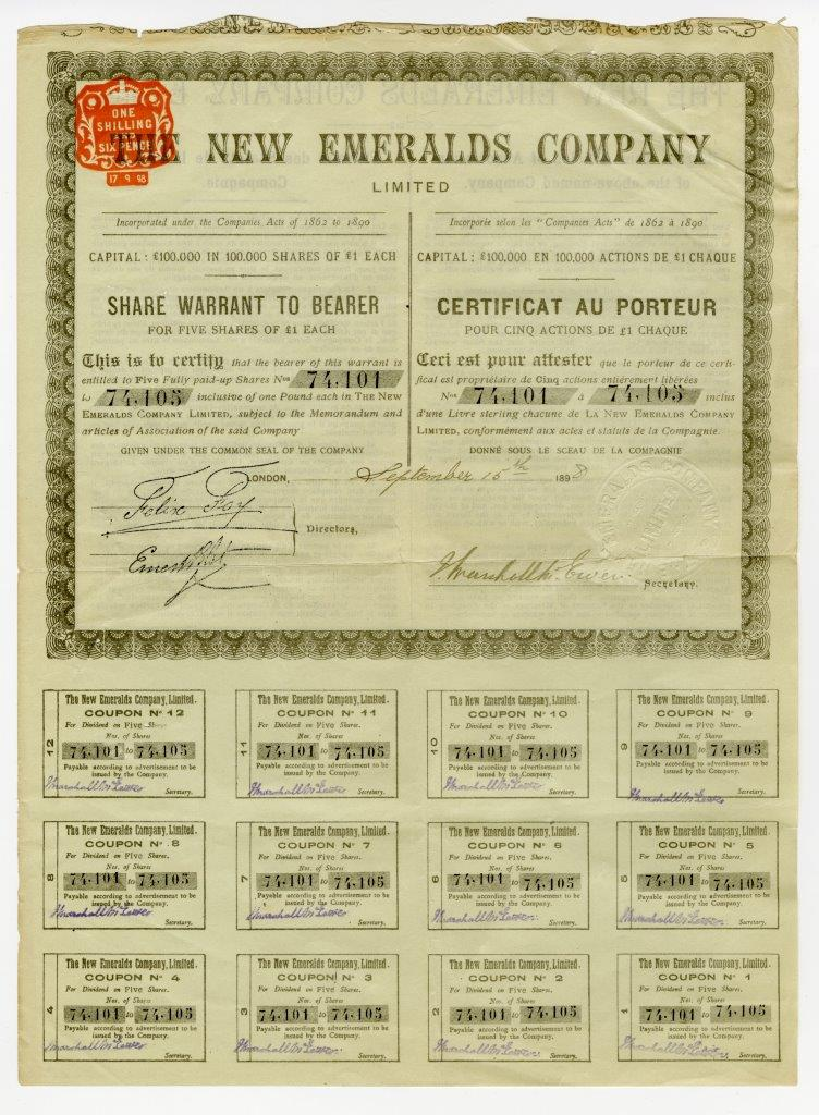 Сертификат на 5 акций в 1 ф.ст. каждая на предъявителя акционерного общества Новая изумрудная компания (New emeralds company limited) с основным капиталом в 100 тыс. ф. ст. Лондон, 1898 г.